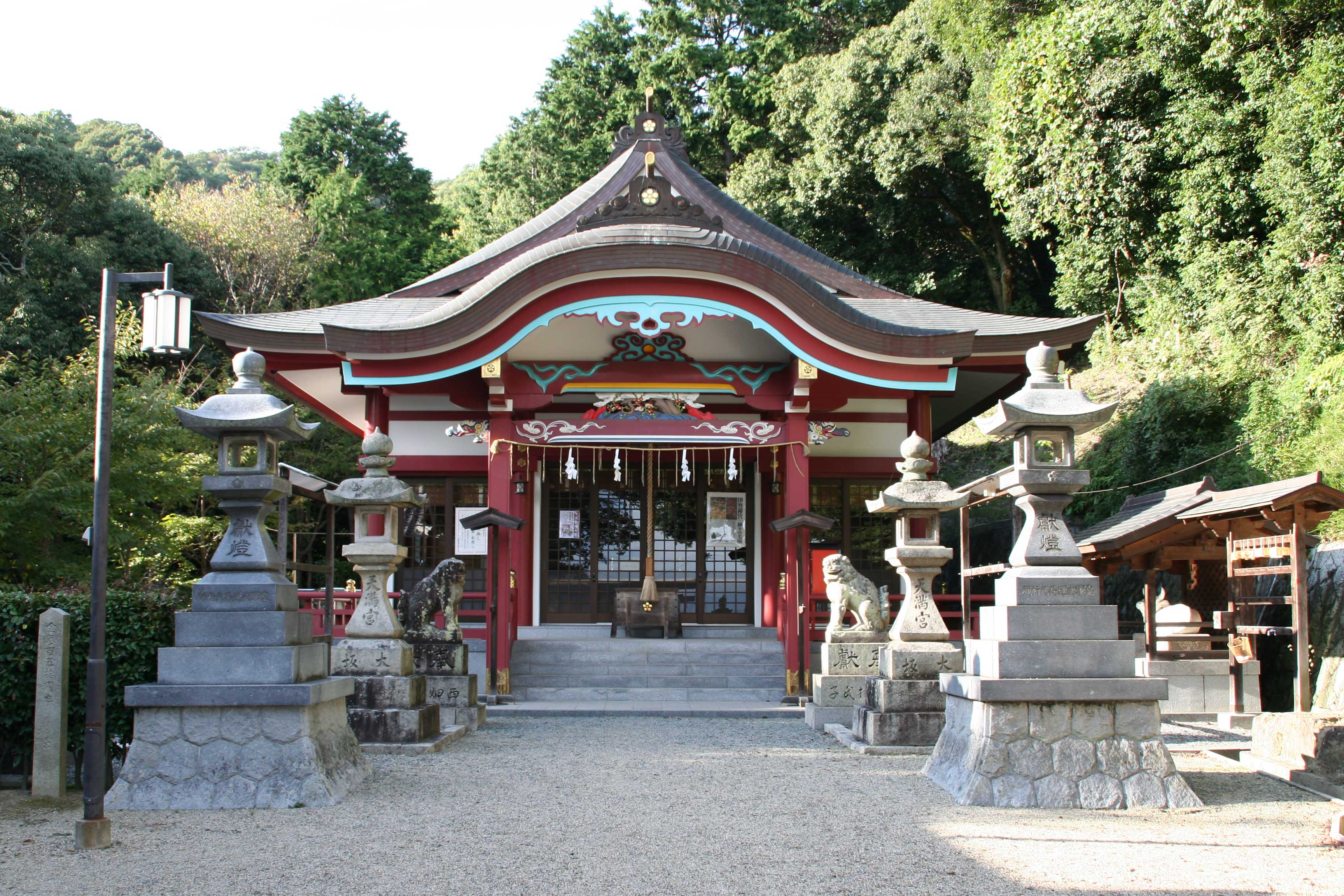 天満宮 (池田市) 拝殿